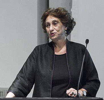 Suad Amiry, palästinensische Autorin und Architektin, 2014